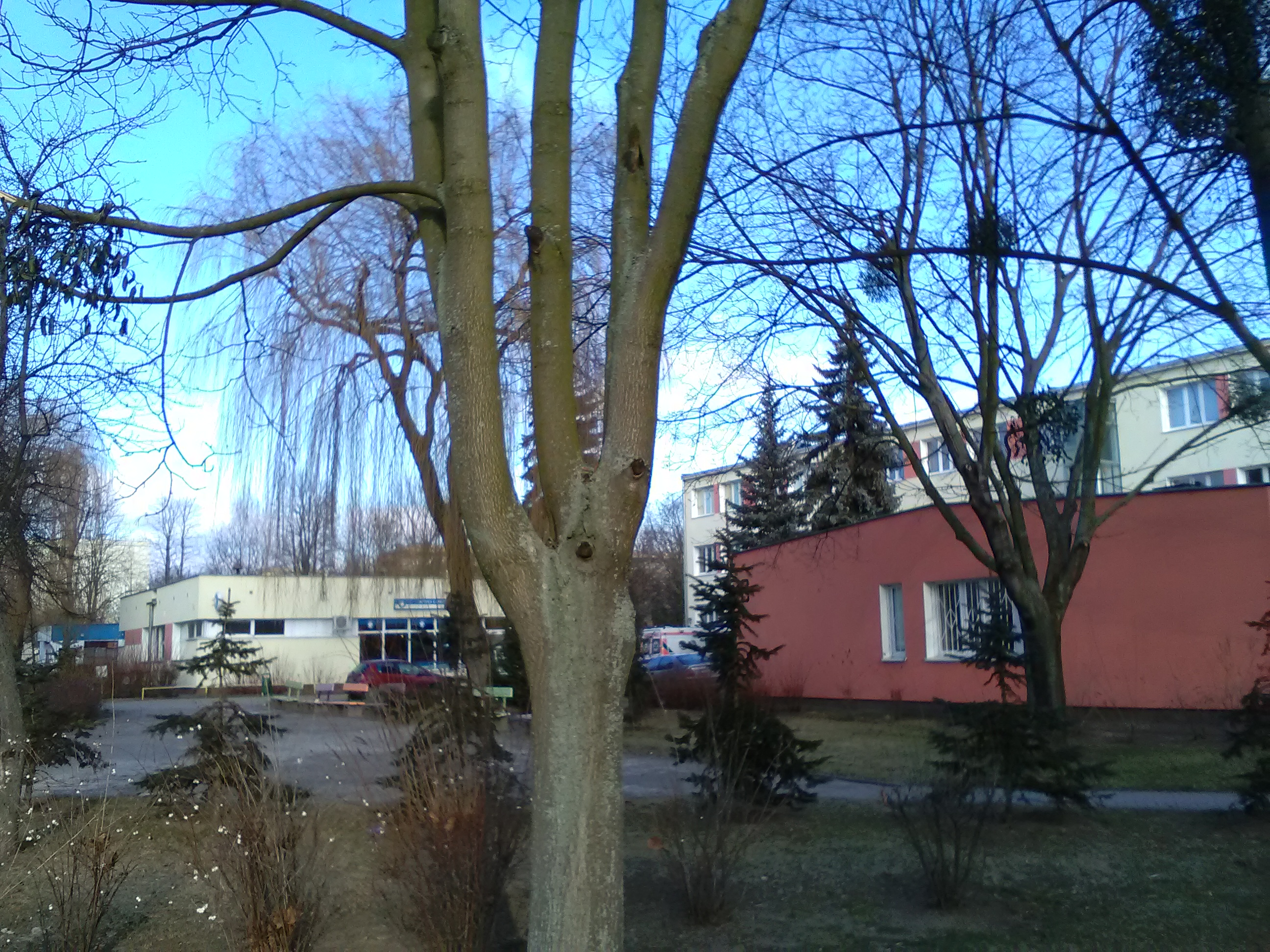 Osiedle Rzeczypospolitej 6 i 6a w Poznaniu- przychodnia lekarska i apteka.